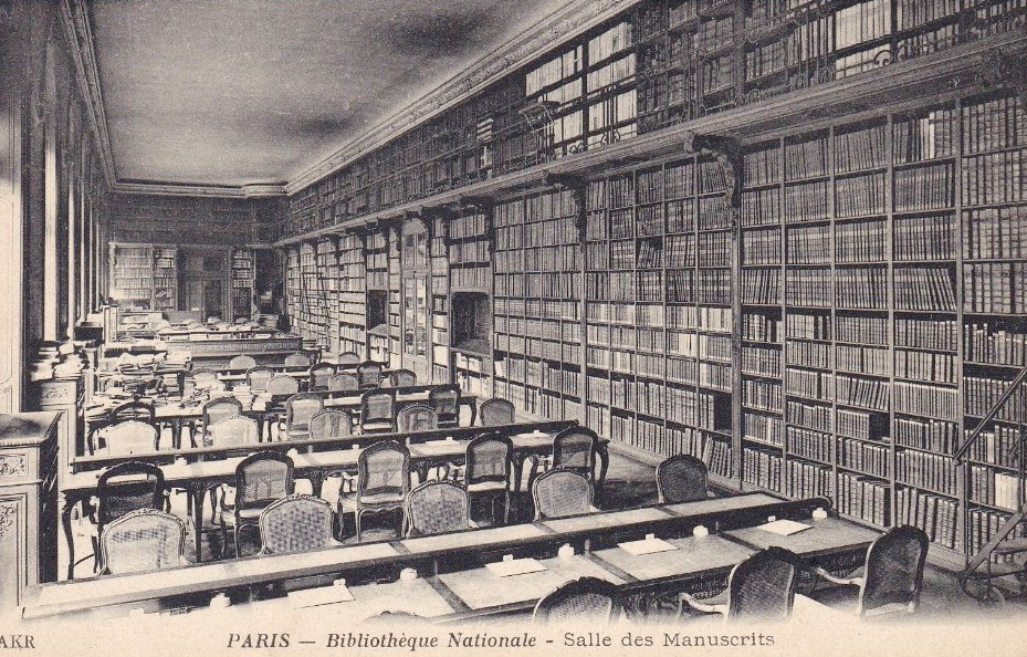 Bibliothèque Nationale, salle des manuscrits. Vers 1910.